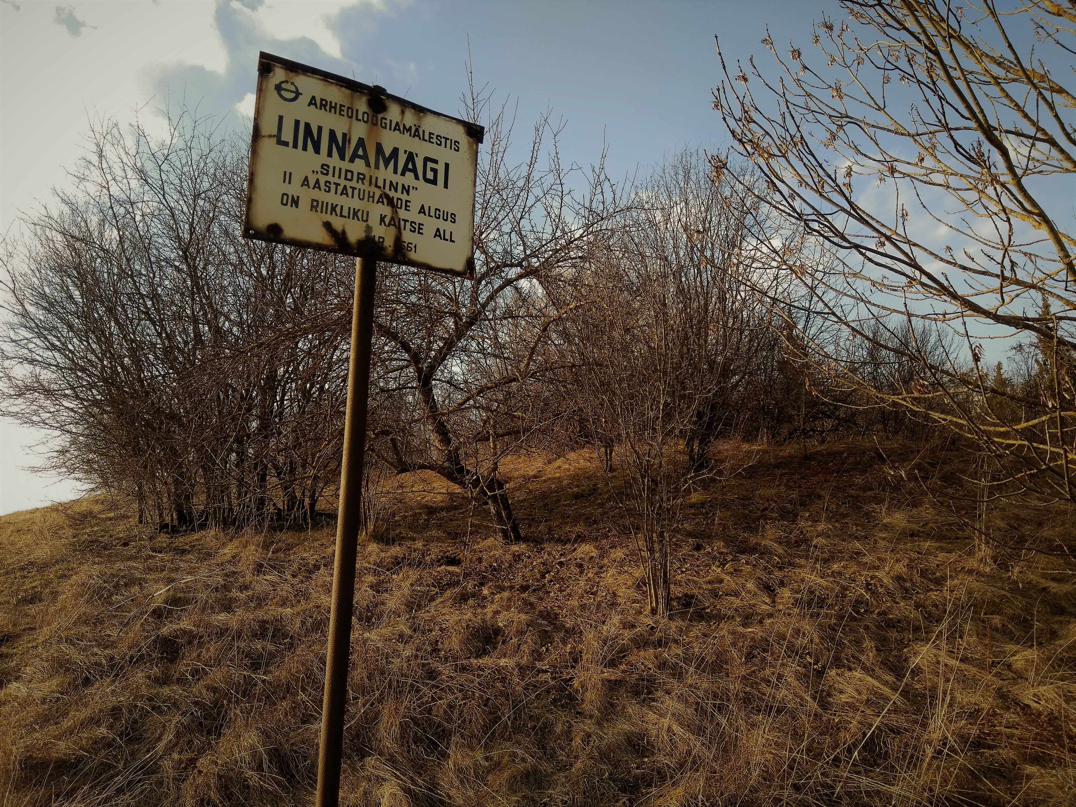 Arheoloogiamälestise teabetahvel linnuse maa-ala lõuna-kagunurgas.